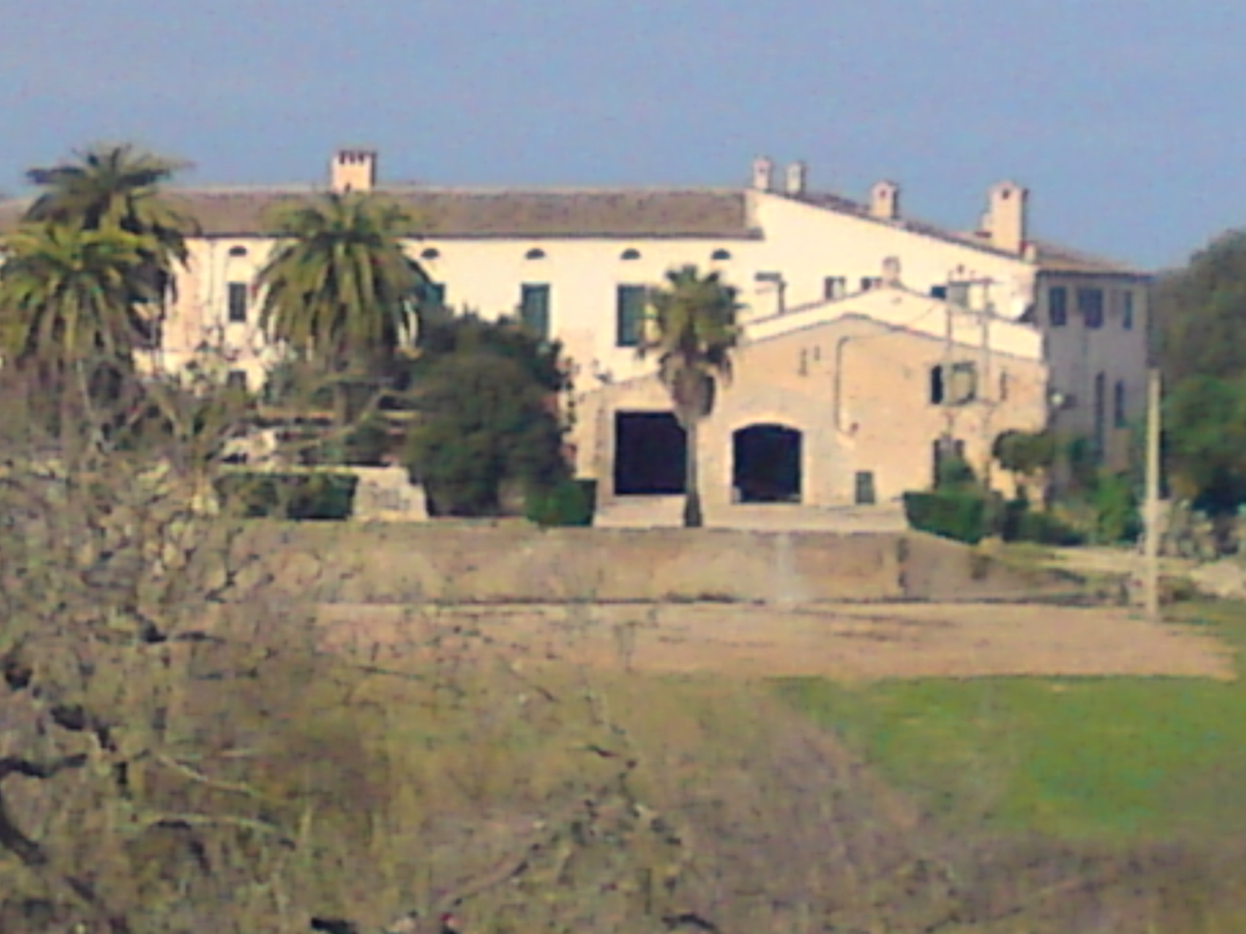 Cases de la possessió de Son Trobat des de la carretera MA-5017 que uneix Randa i Montuïri